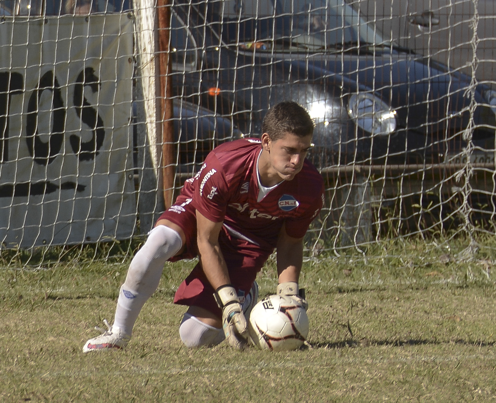 Camilo Rodríguez Buchelli. Arquero del Club Nacional de Futbol, Montevideo.